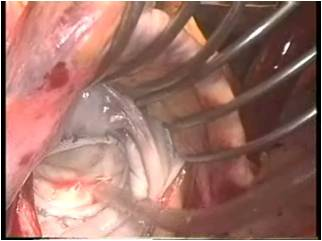 Prueba con suero fisológico que muestra la buena competencia de la reparación.